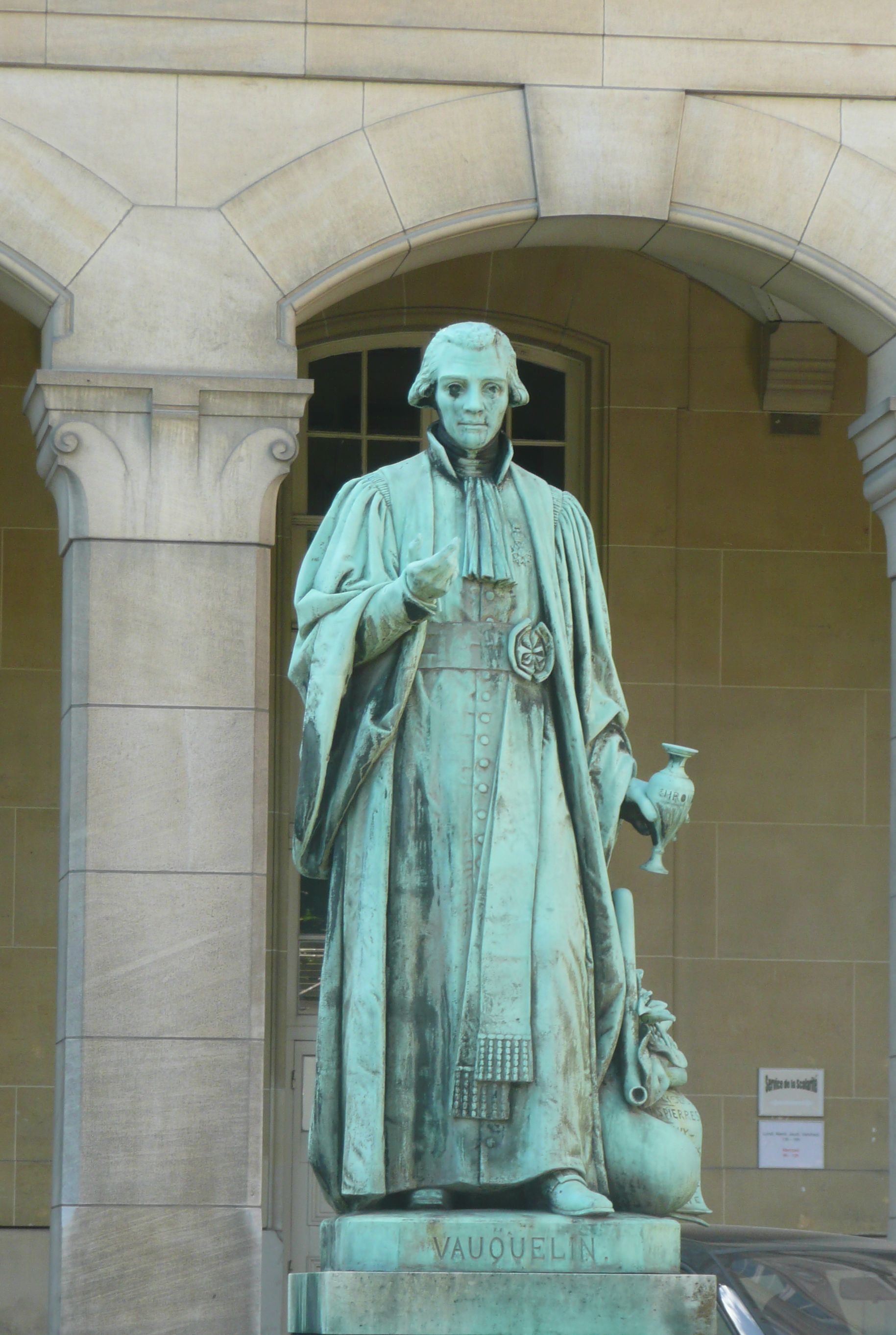 Statue de Vauquelin à la faculté de pharmacie à Paris, bronze par Pierre Hébert, 1866